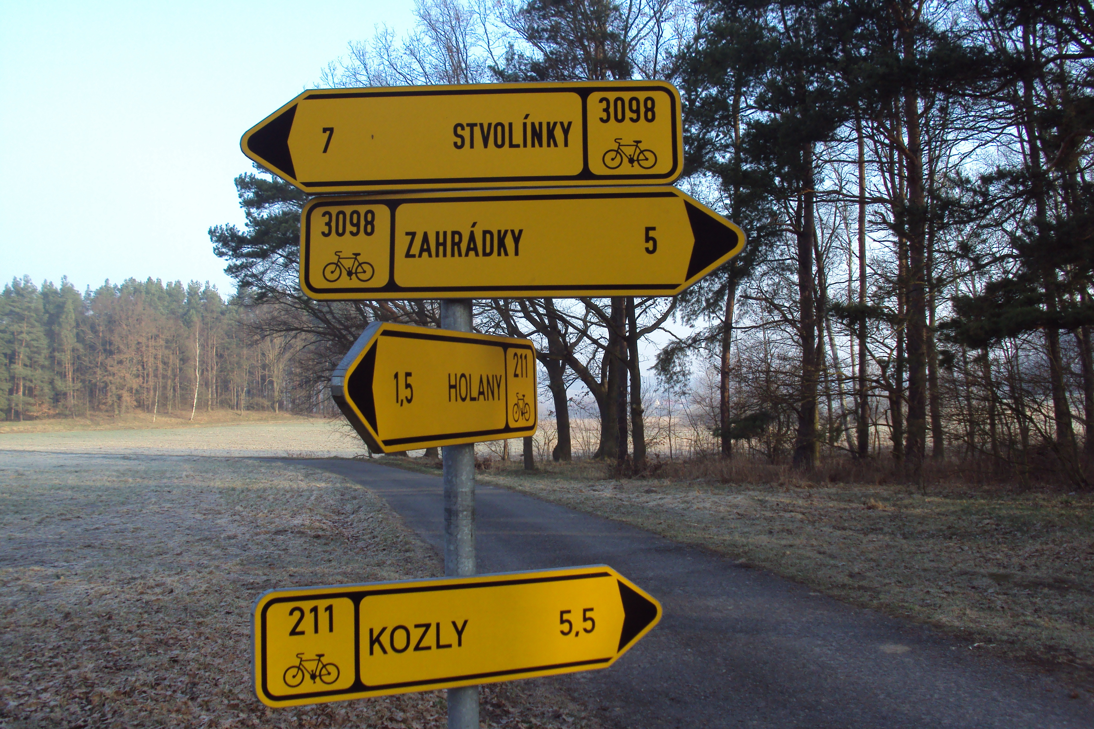 Za Rybnovem u Holan je křižovatka pěší červené a dvou cyklotras